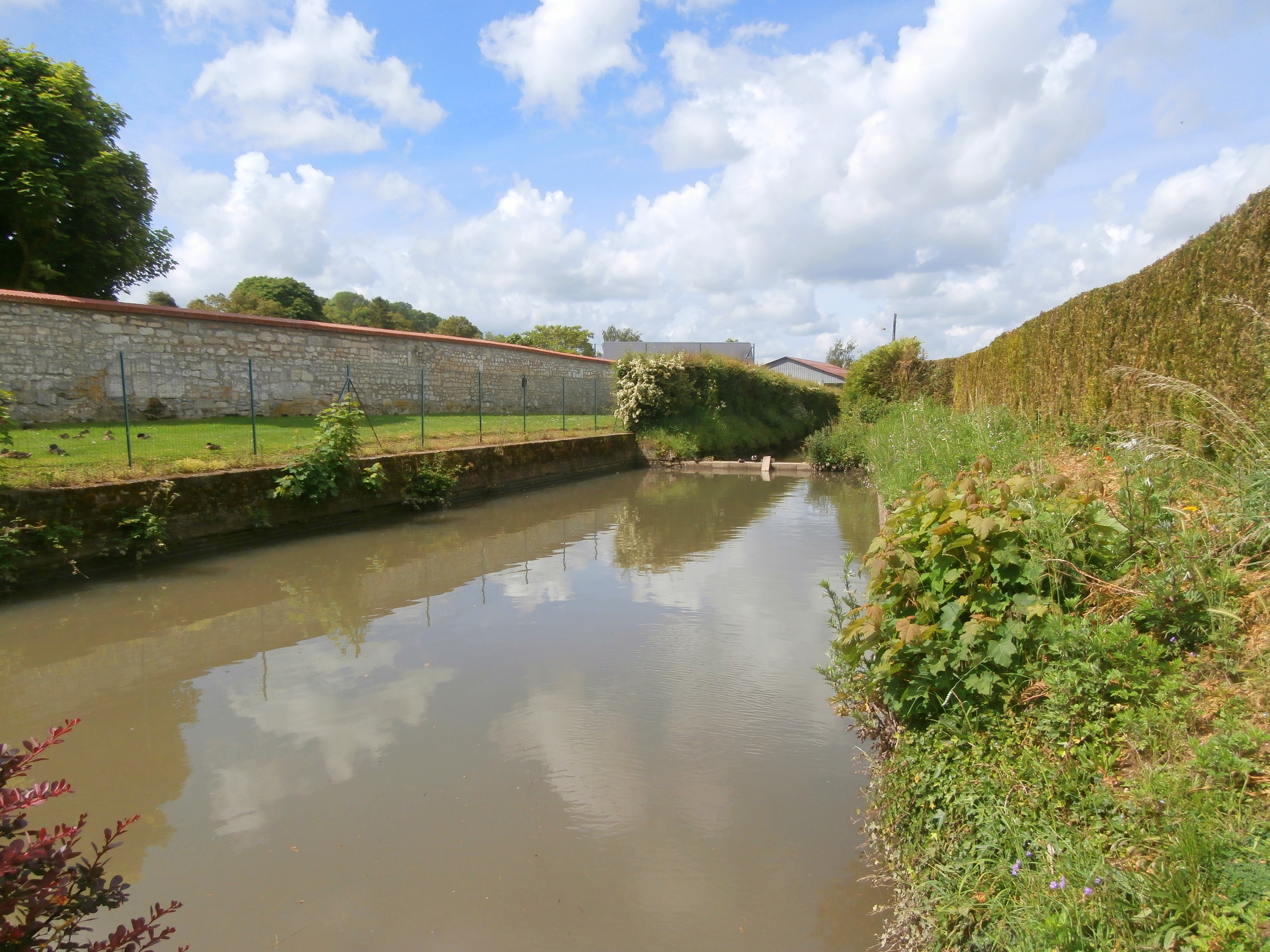 Mare dite Fossé de Lannoy à Saint-Aubin-sous-Erquery (60).